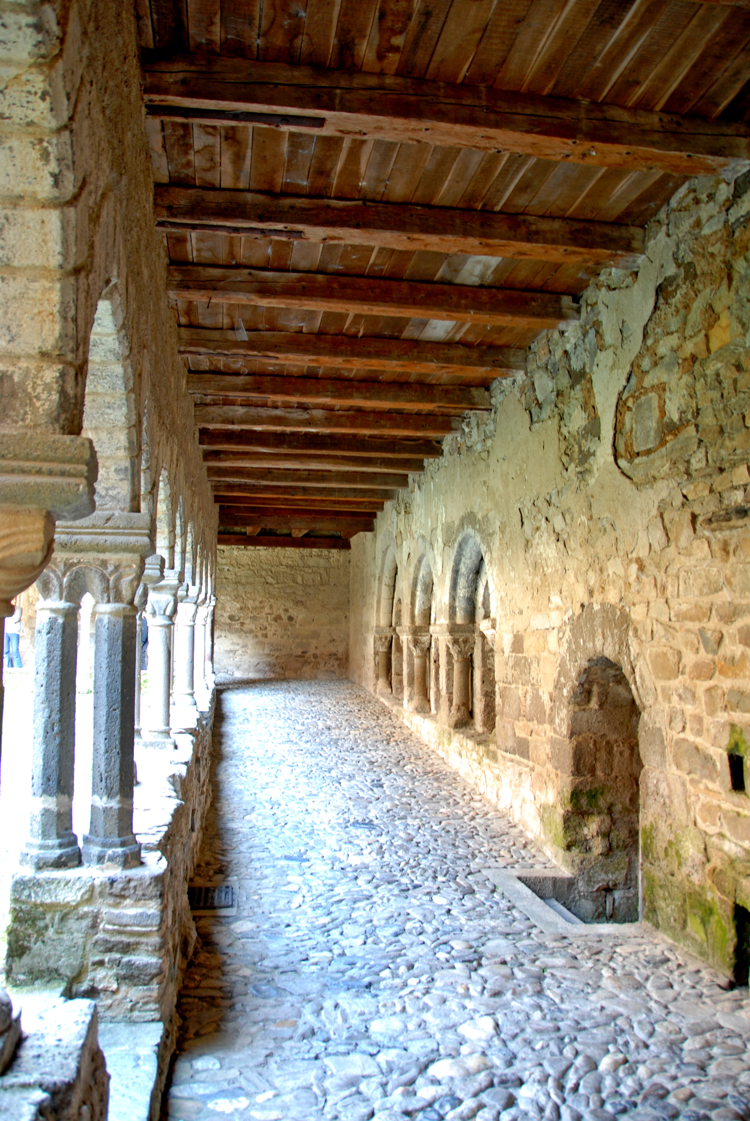 Abtei St.-André Lavaudieu, Kreuzgang, Kapitell, Ostgalerie nach N